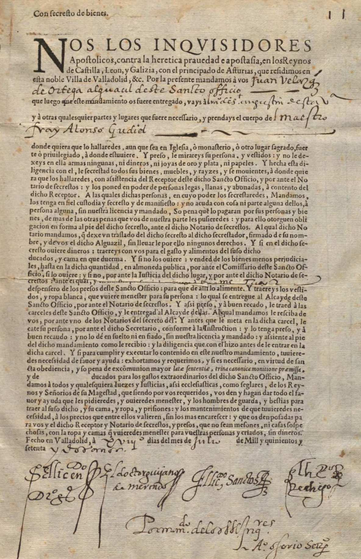 Edicto de la Inquisición contra el maestro Alonso Gudiel, 1572: "Nos los inquisidores Apostólicos contra la herética pravedad e apostasía, en los Reynos de Castilla, León y Galicia, con el principado de Asturias, que residimos en esta noble villa de Valladolid, etc.: por la presenta mandamos a vos Juan Velázquez de Ortega, alguacil deste Santo Officio, que luego que este mandamiento os fuere entregado, va[yai]s al monasterio de San Agustín desta villa, y a otras qualesquier parte y lugares que fuere necesario, y prendays el cuerpo del maestro fray Alonso Gudiel...", Proceso seguido en la Inquisición de Valladolid contra Fr. Alonso Gudiel, de la Orden de San Agustín y Lector de Teología en la Universidad de Osuna, Biblioteca Nacional de España, signatura Mss/12751